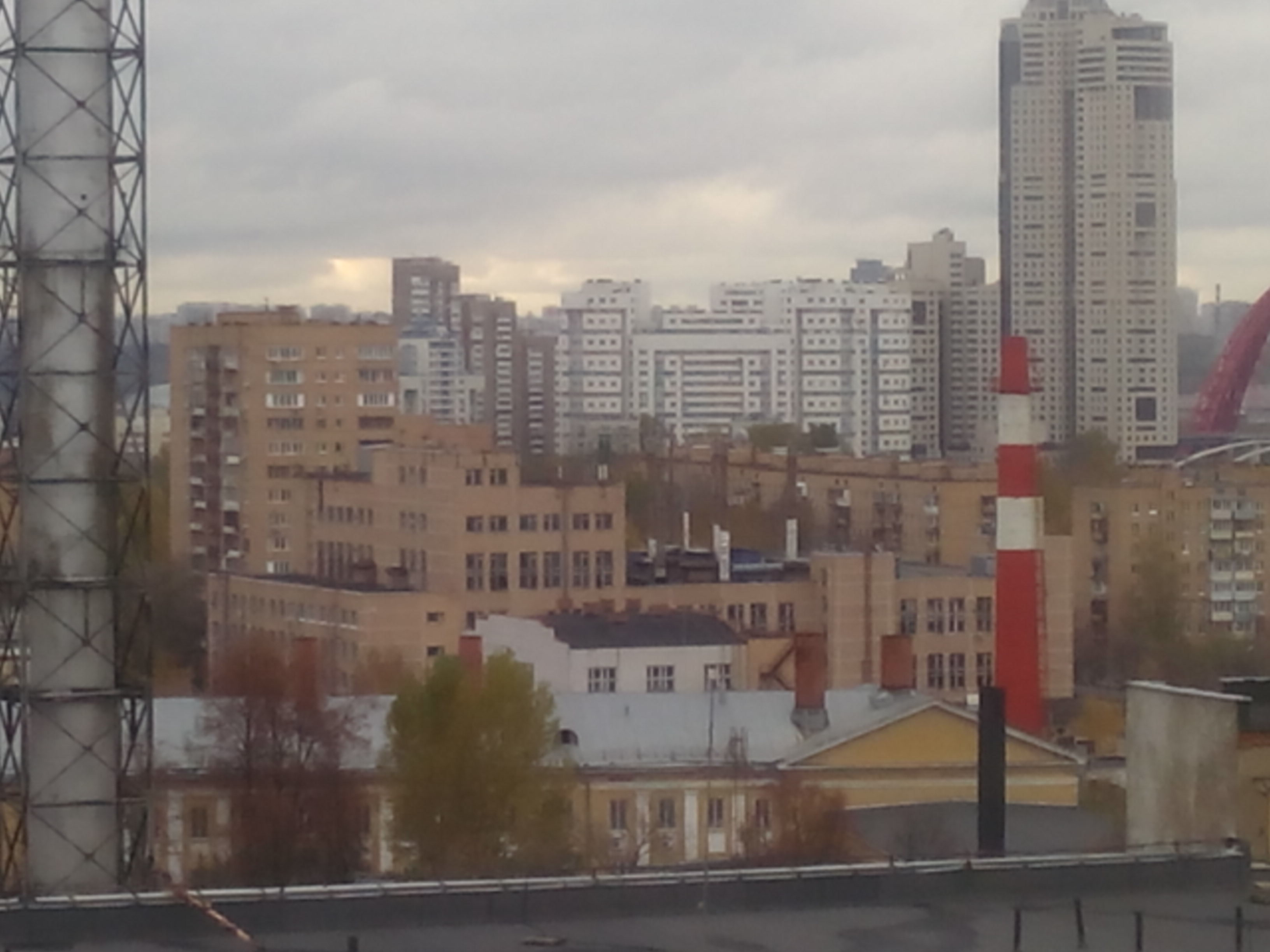 Хлебозавод № 17, Москва. Панорама с юга. На переднем плане жёлтый корпус "В" ВНИИНМ на улице Берзарина, и труба его же. Хлебозавод располагался к югу от ВНИИНМ, между улицами Берзарина и Паршина. Снесен в мае 2017, застройщиком участка назван "Инград" Романа Авдеева. Cправа вдали башня "Континенталь" на Жукова 78